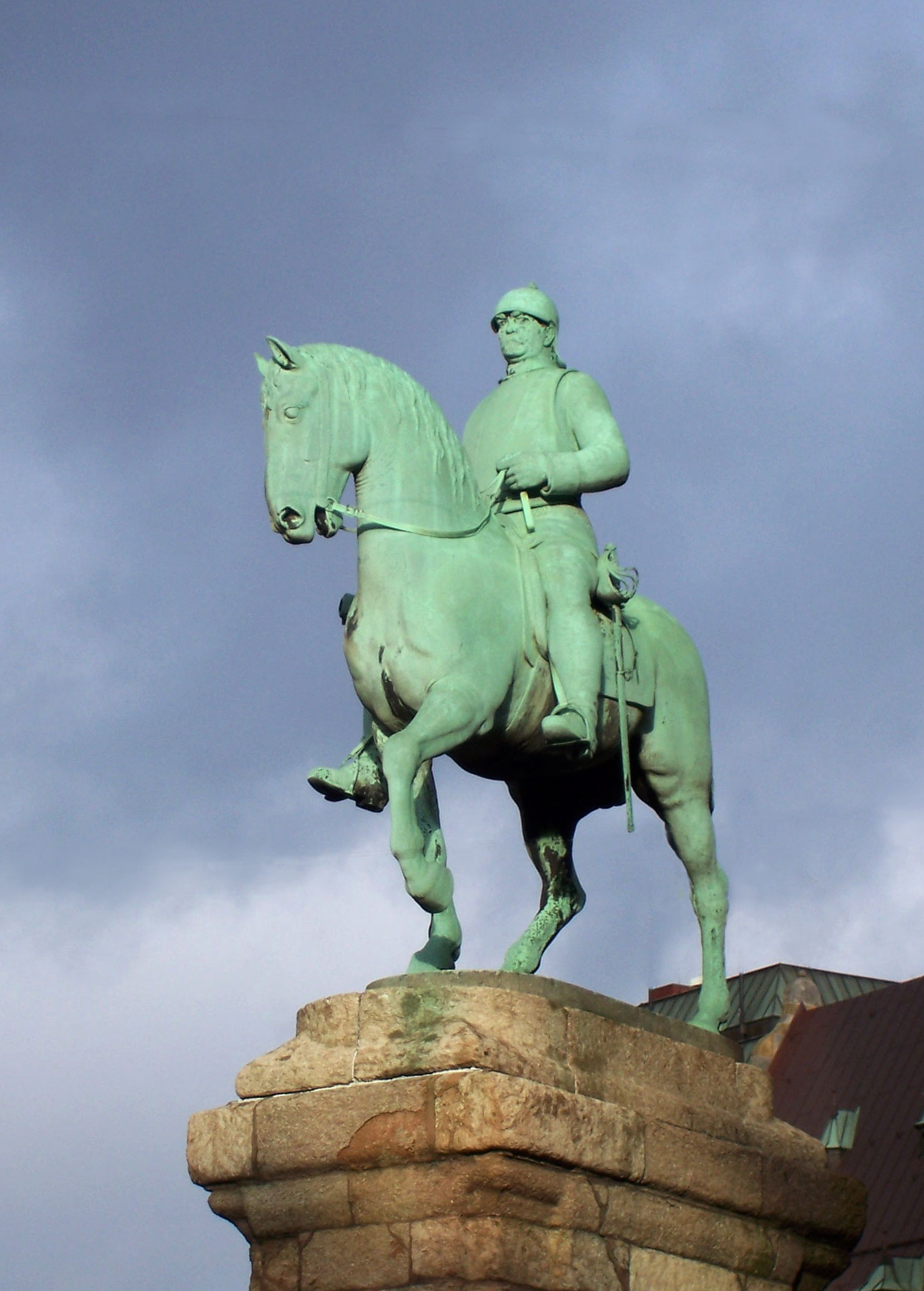 Reiterstandbild Bismarck neben dem Bremer Dom. Entwurf: Adolf von Hildebrand. Enthüllt 1910.